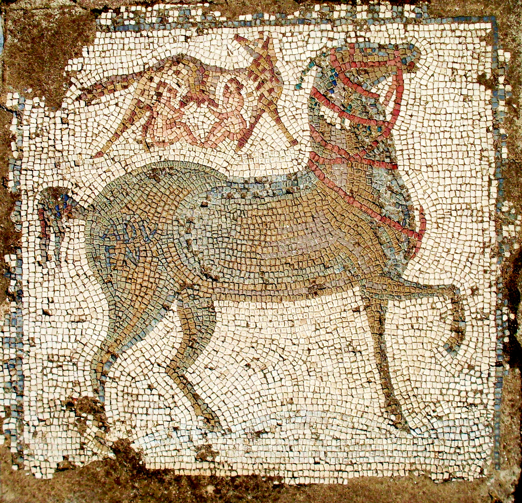 Panneau de la mosaïque des cheveaux